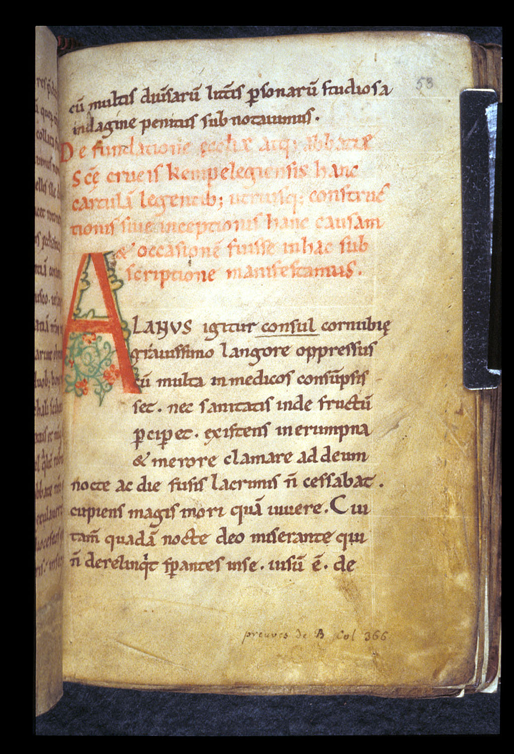 Page du cartulaire de Quimperlé